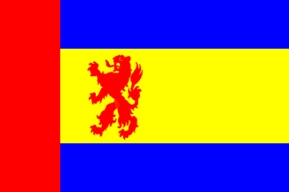 Vlag gemeente Opmeer